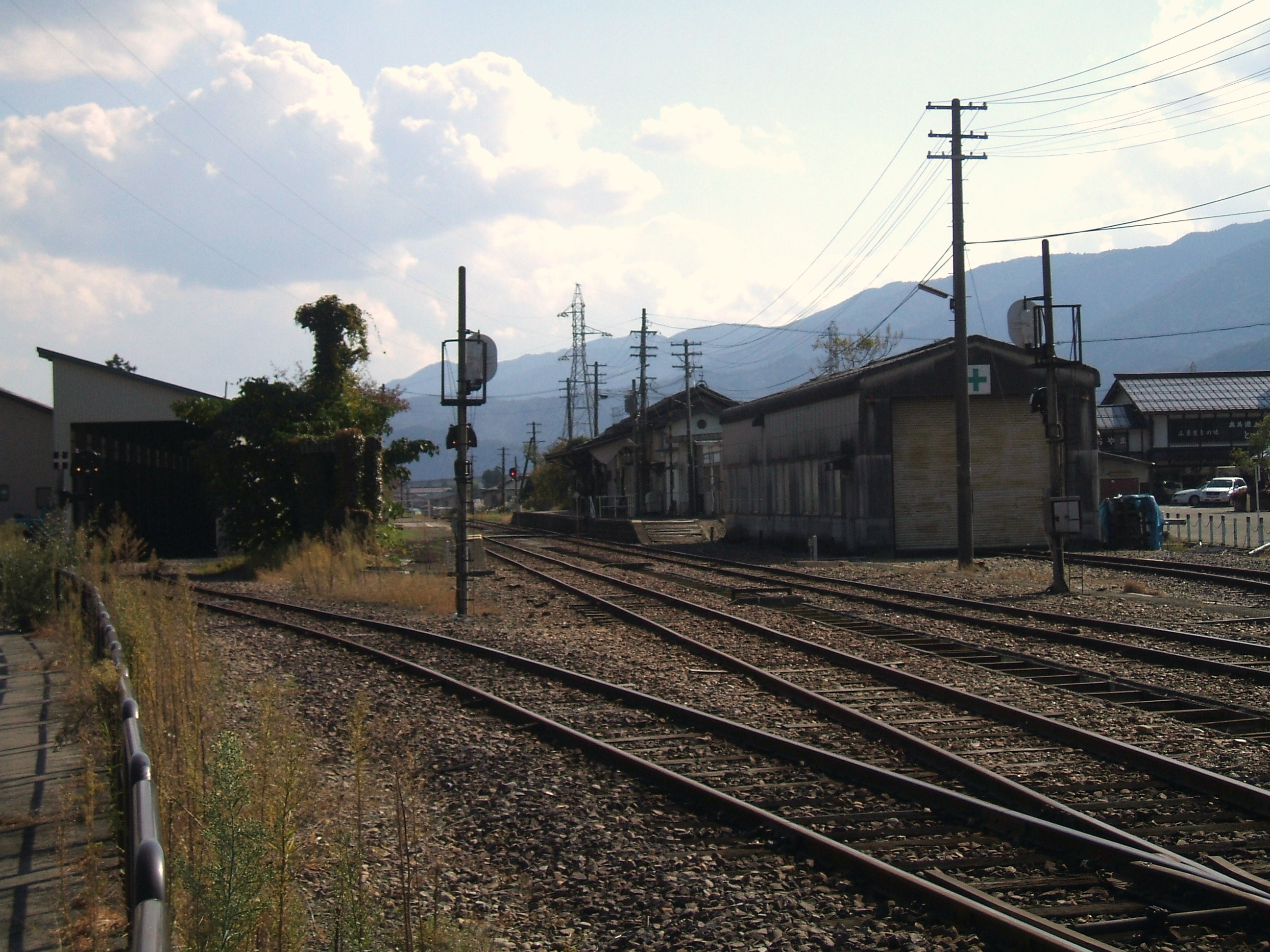 北側から見た美濃白鳥駅